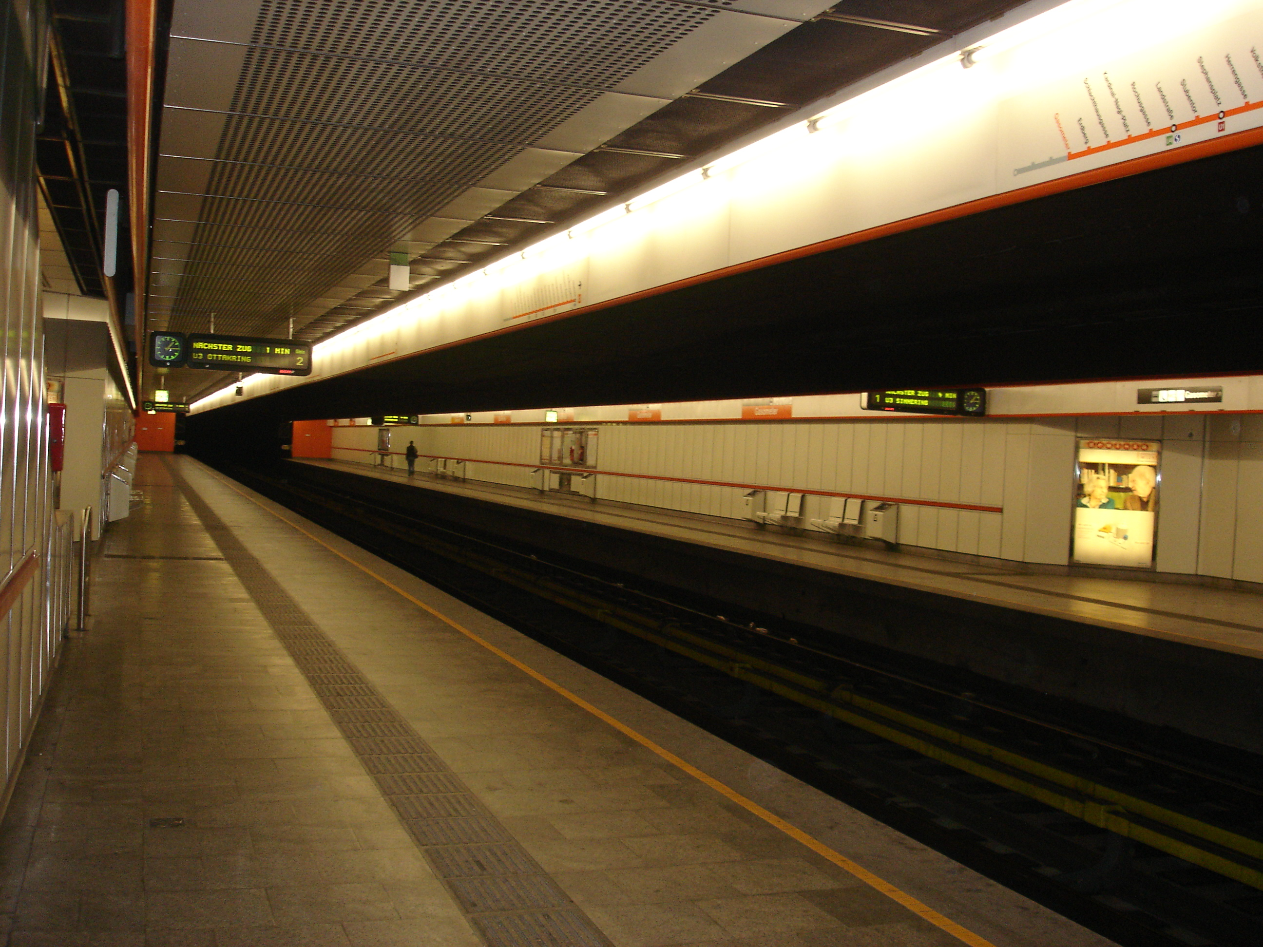 U3, Wien, Station "Gasometer"